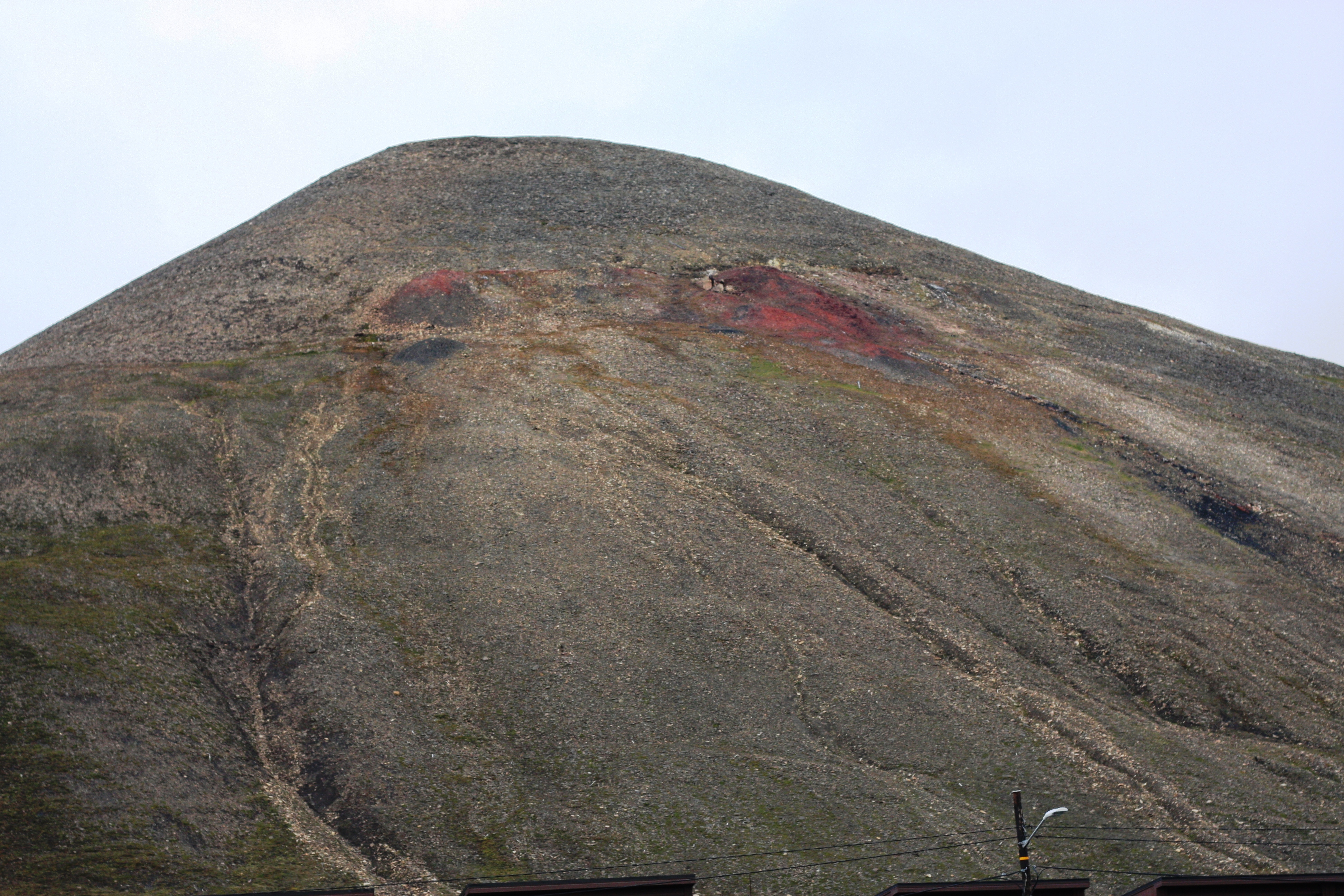 Mine No 2a, above Longyearbyen, Spitsbergen (Norway)